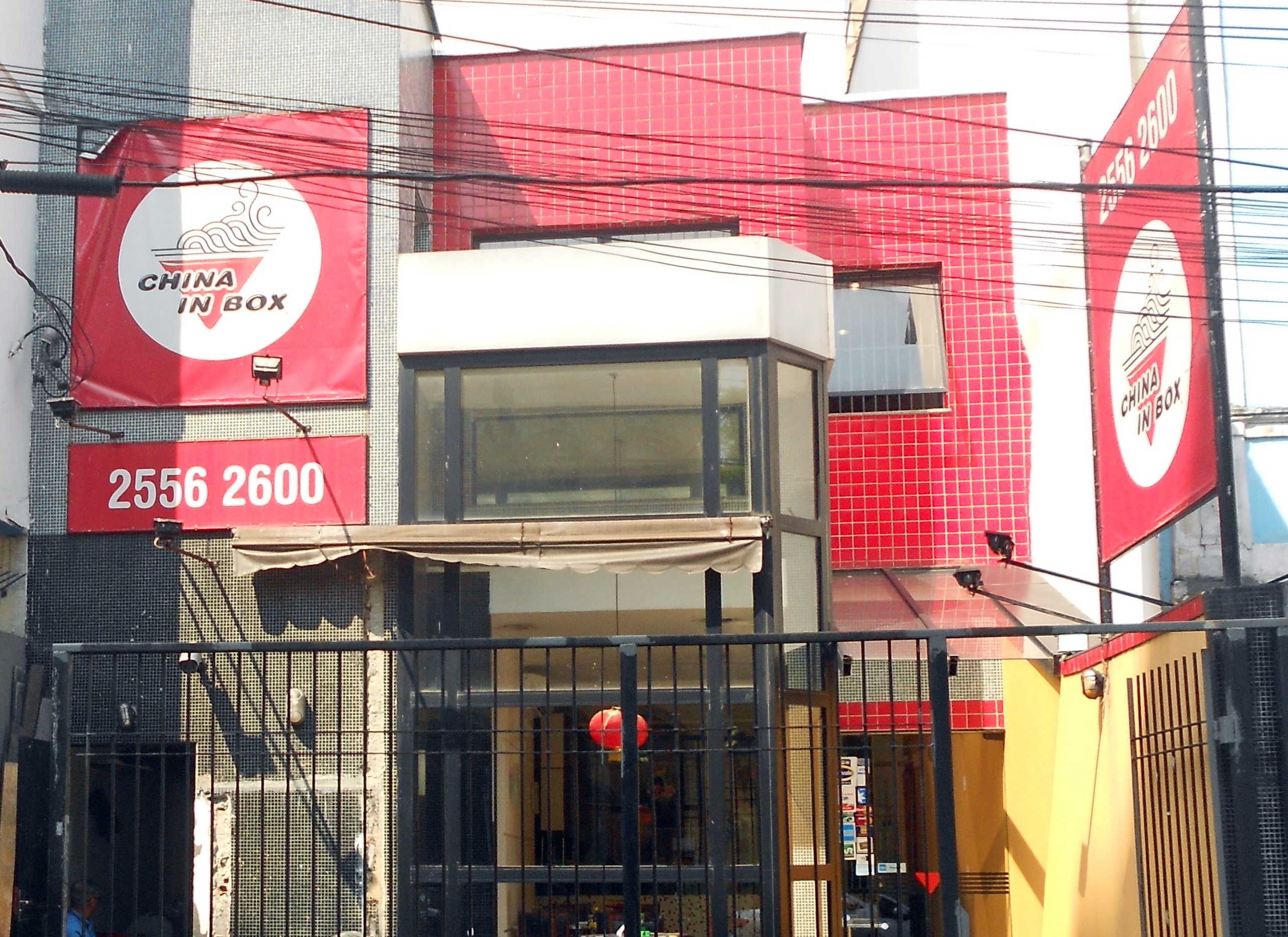 Restaurante China in Box, situado na Rua Ipiranga, Laranjeiras, Rio de Janeiro, Brasil.